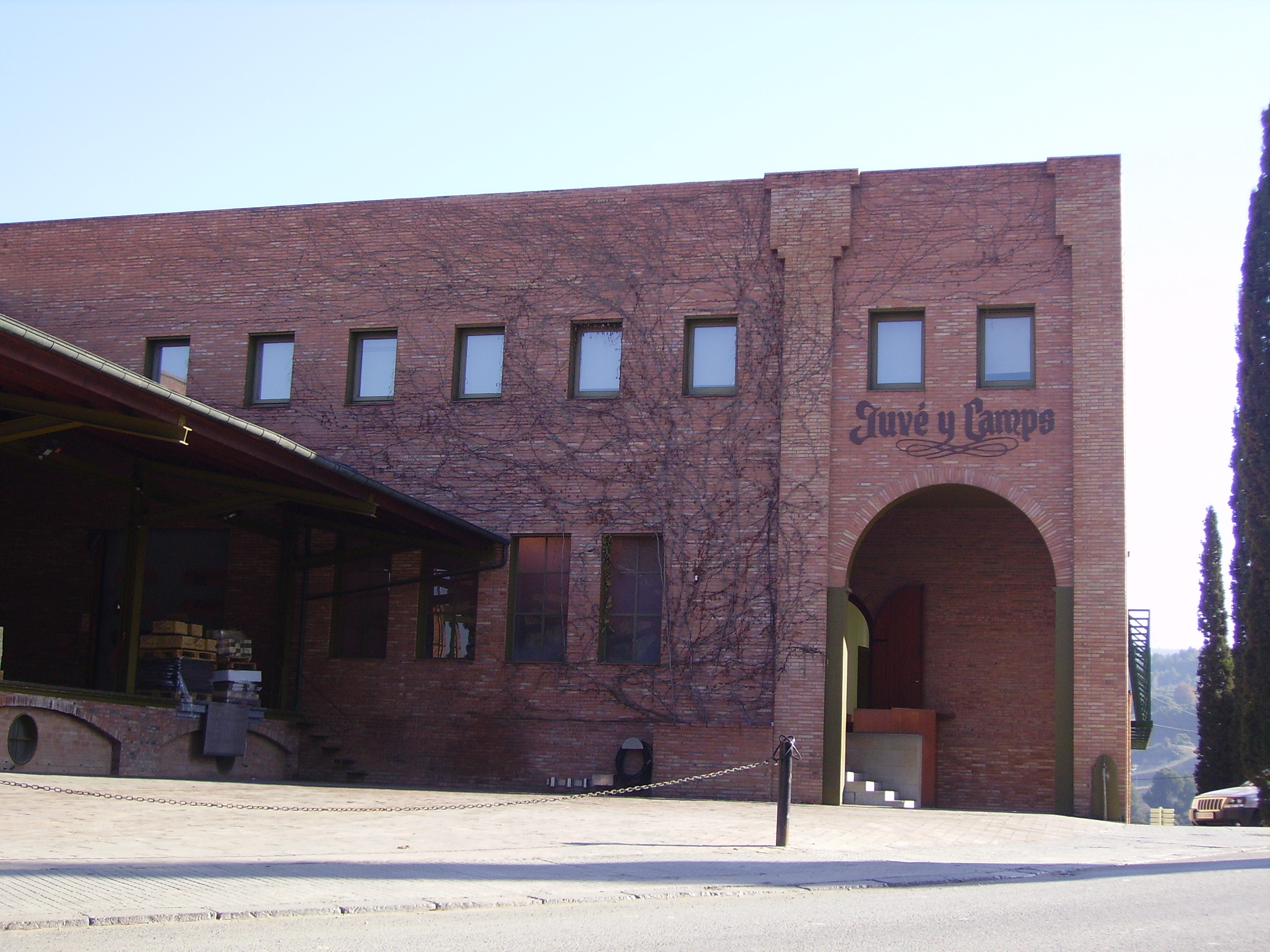 Caves Juvé y Camps a Sant Sadurní d'Anoia, Alt Penedès, Catalunya.